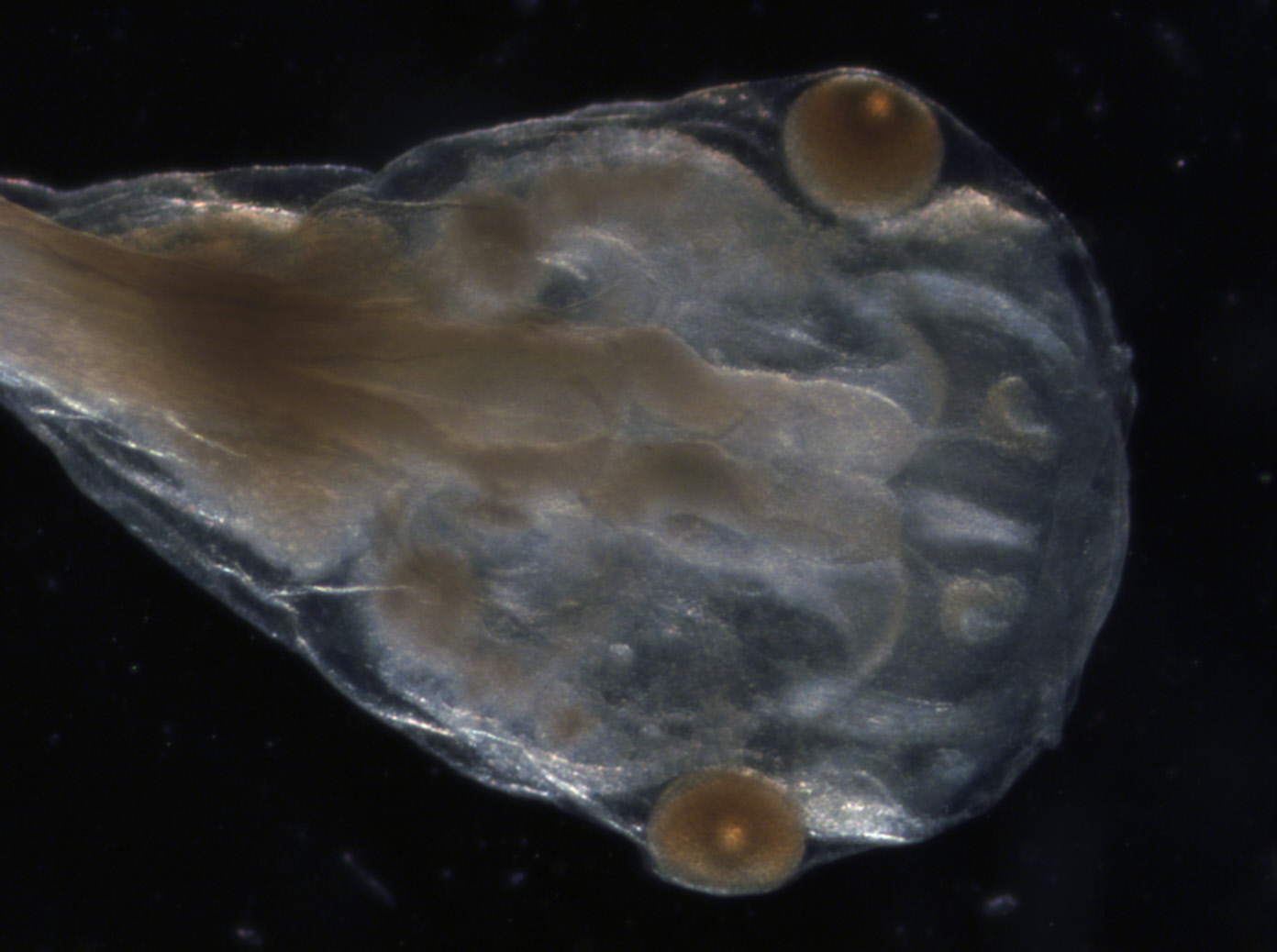 Têtard de Xenopus tropicalis Unknown